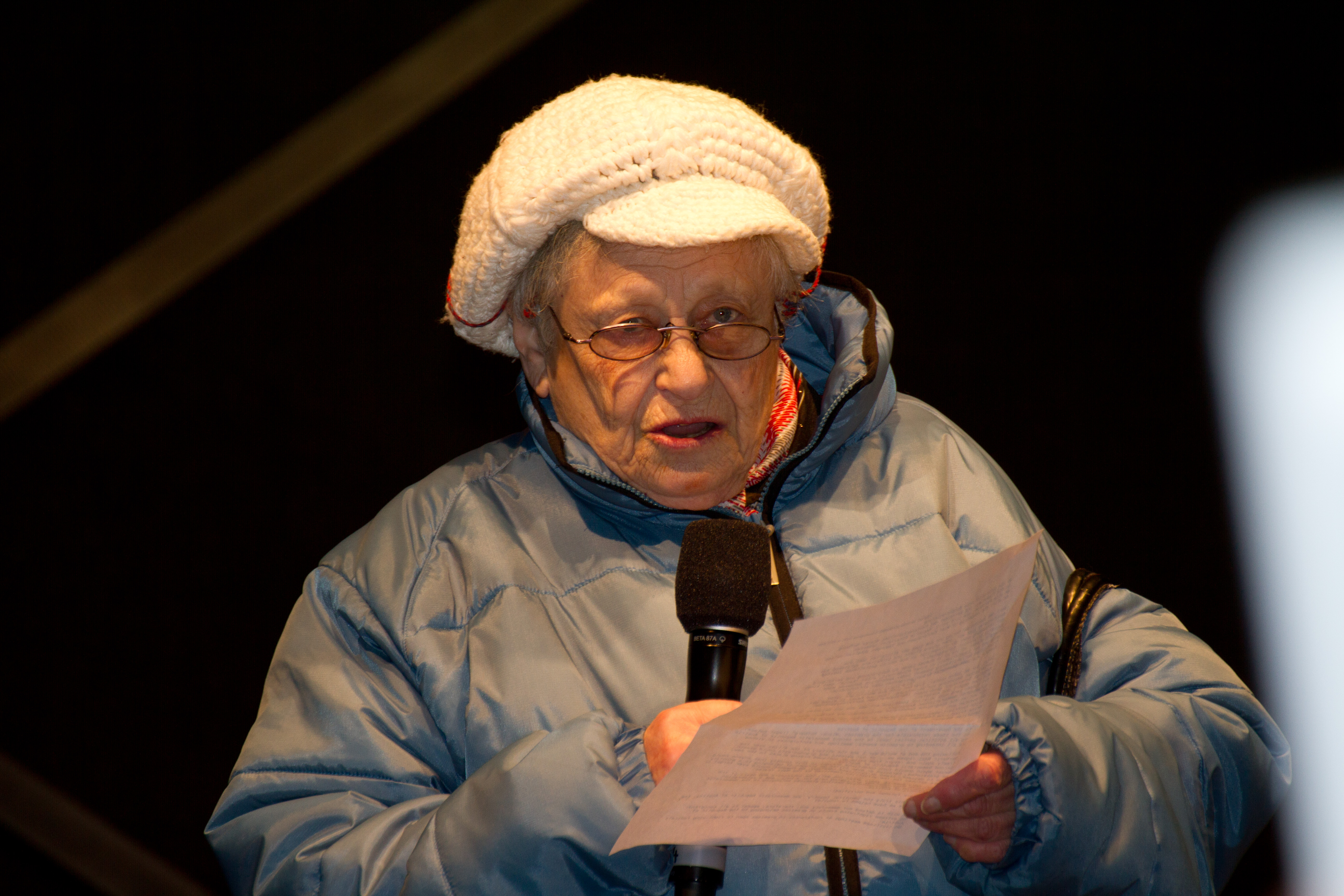 Holocaust-Überlebende Dora Schimanko bei "Jetzt Zeichen setzen" gegen den WKR-Ball 2012